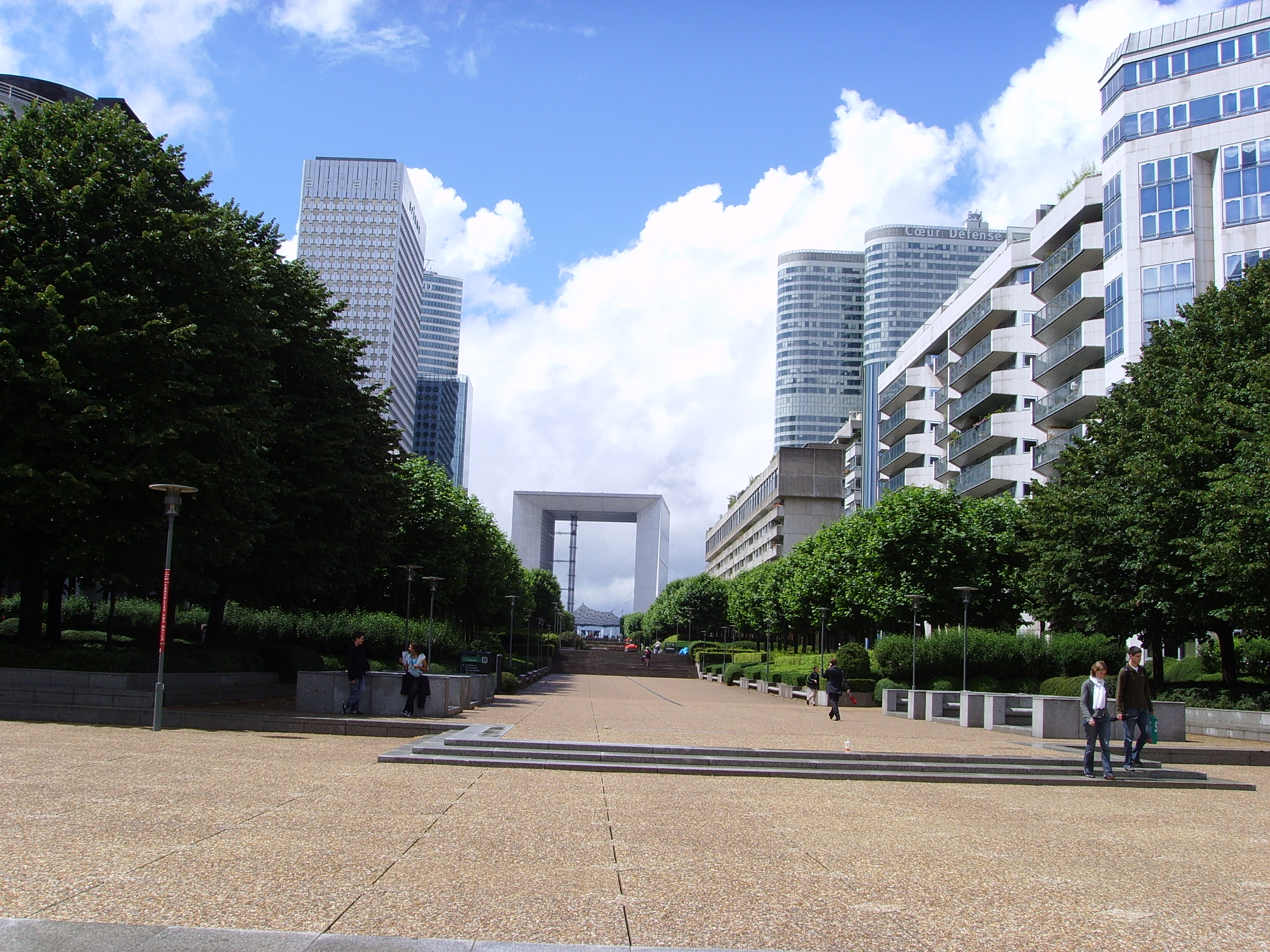 La Défense, Paris business quartier